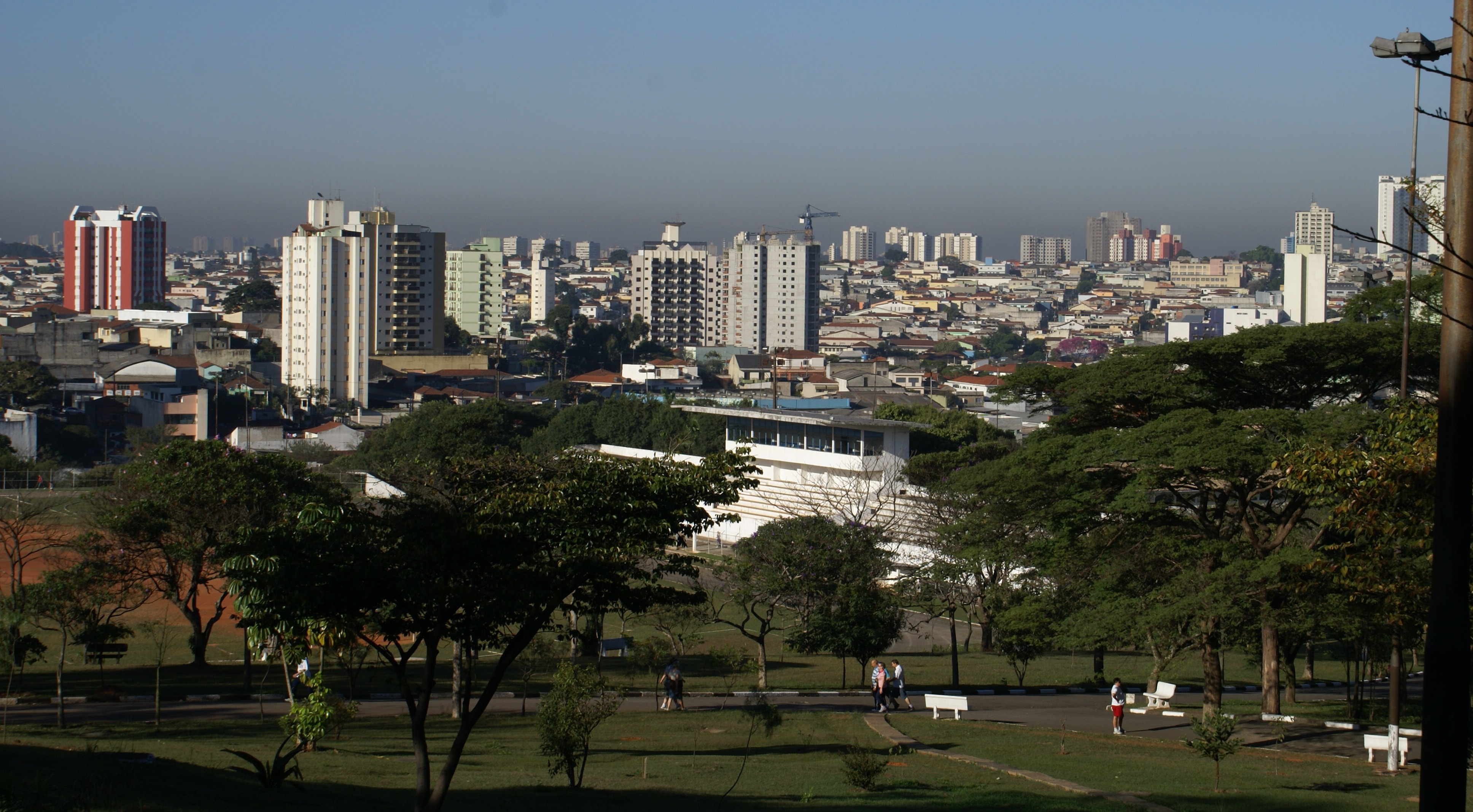 Vista à partir do Parque Anália Franco, em São Paulo, Brasil. - Vision by Anália Franco Park, in São Paulo City, Brazil.